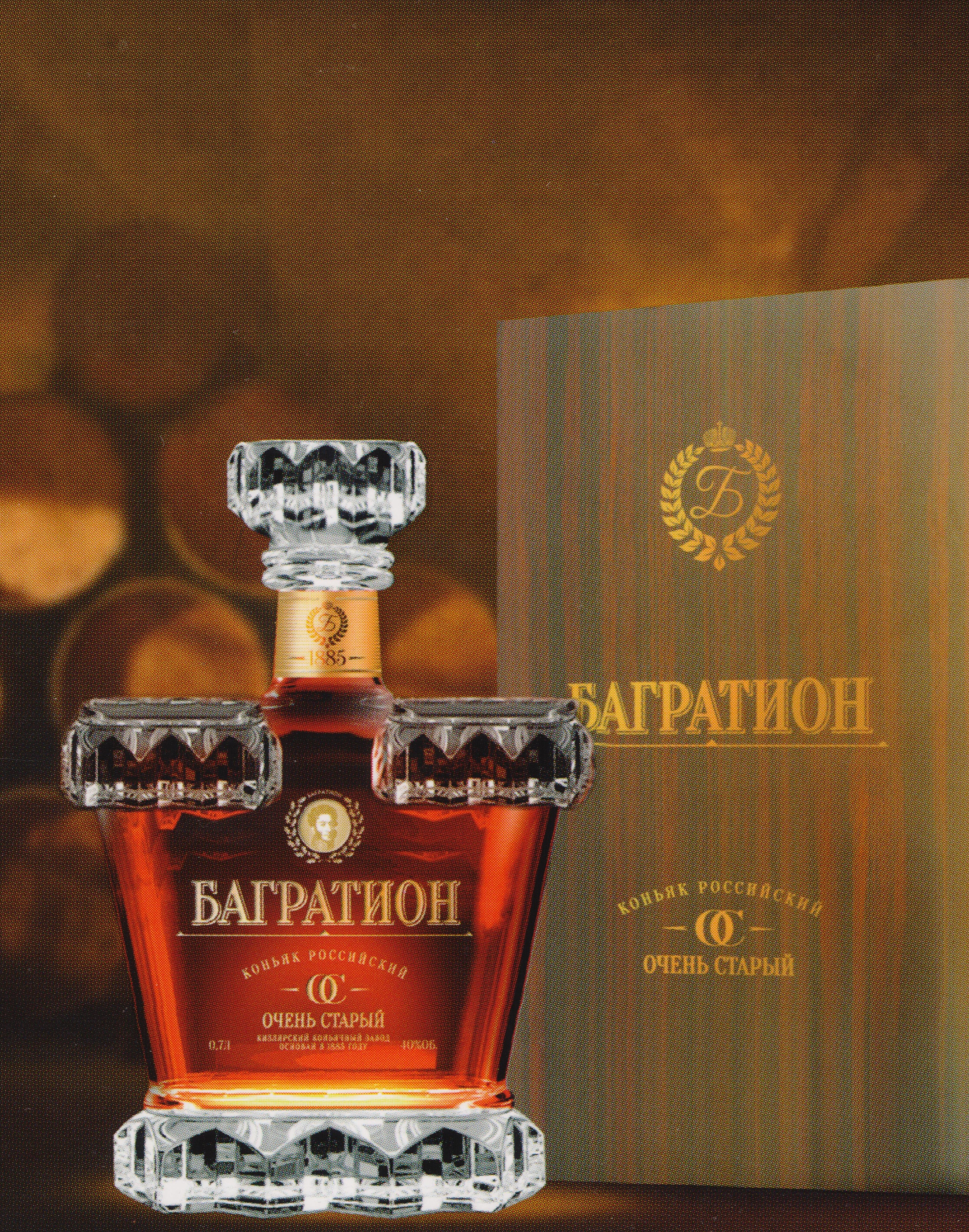 Коньяк Багратион 20 лет